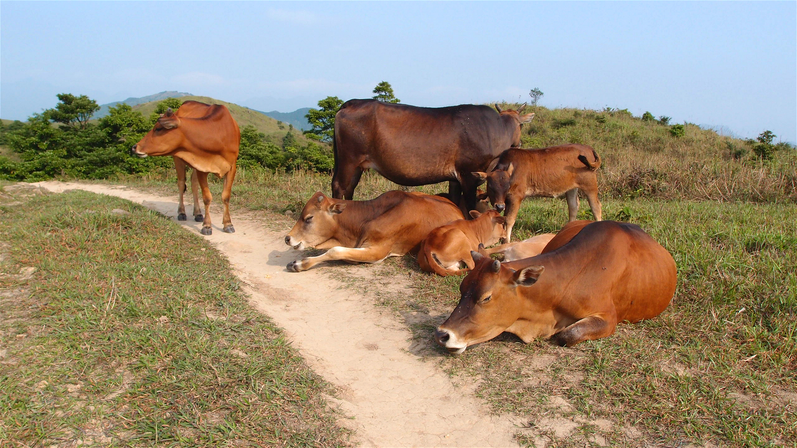 粵語: 四方山的草原，有牛群定居